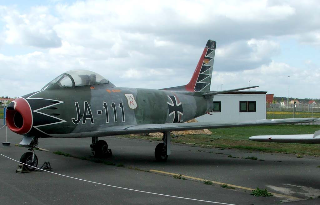 F-86 Sabre (JA-111) - Luftwaffe Museum - Gatow-Berlin - 2007